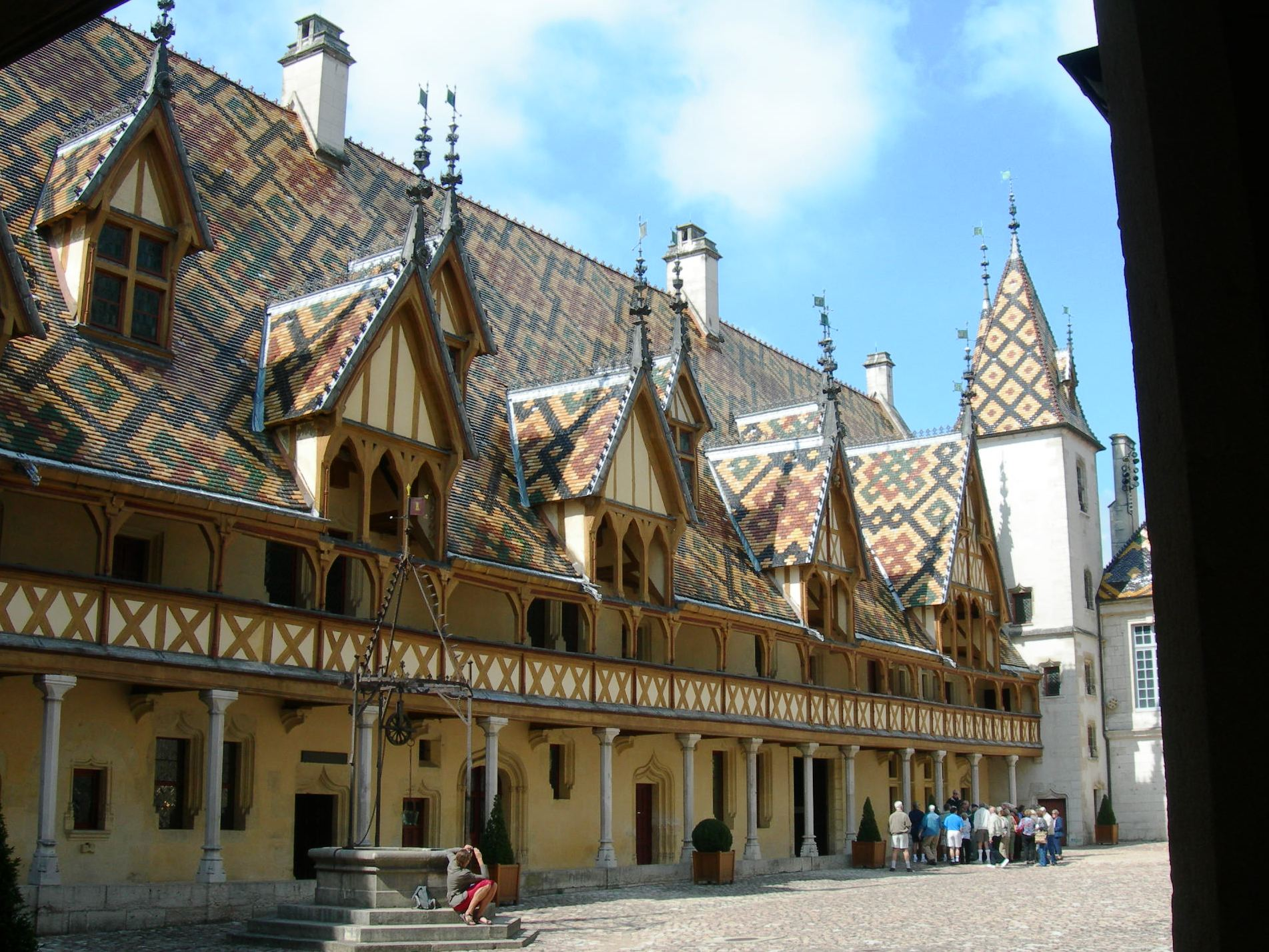 Beaune (F) hospital (Hotel-Dieu)